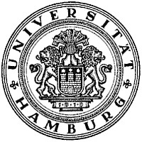 Siegel der Universität Hamburg